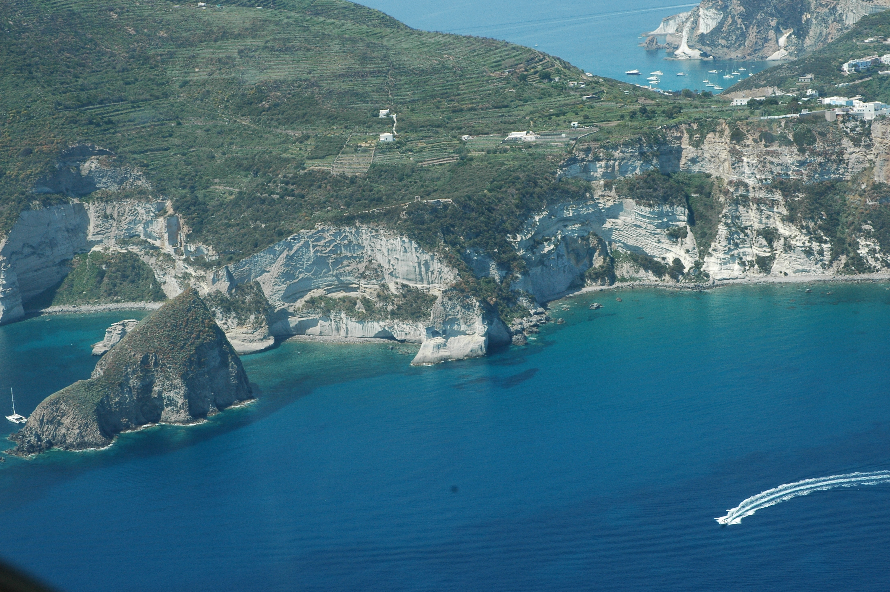 Volo Sabaudia-Terracina-Isole Ponziane a bordo del Tecnam P2002 JF marche I-FADA. Nella foto, Ponza